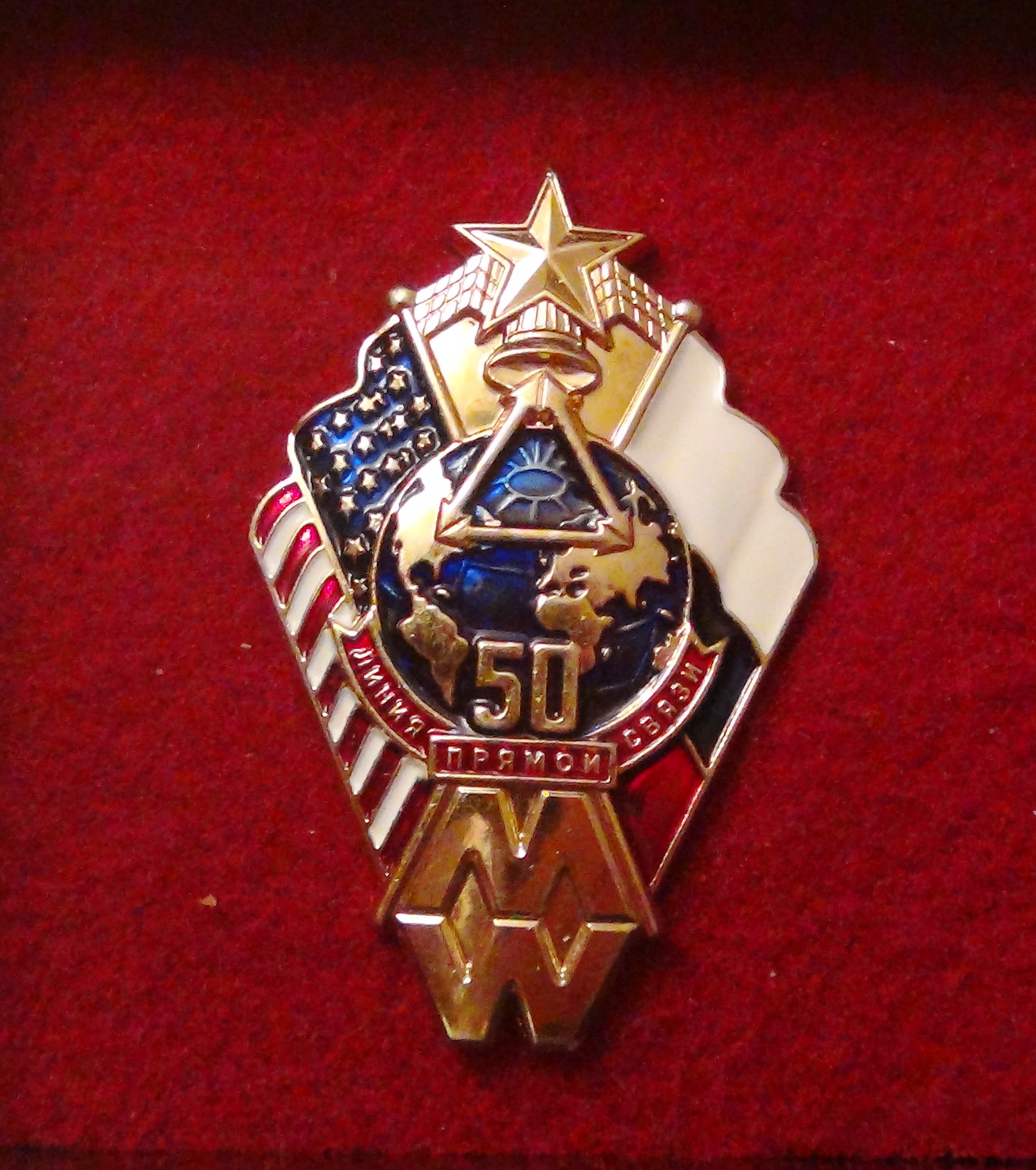 50 лет на прямой связи